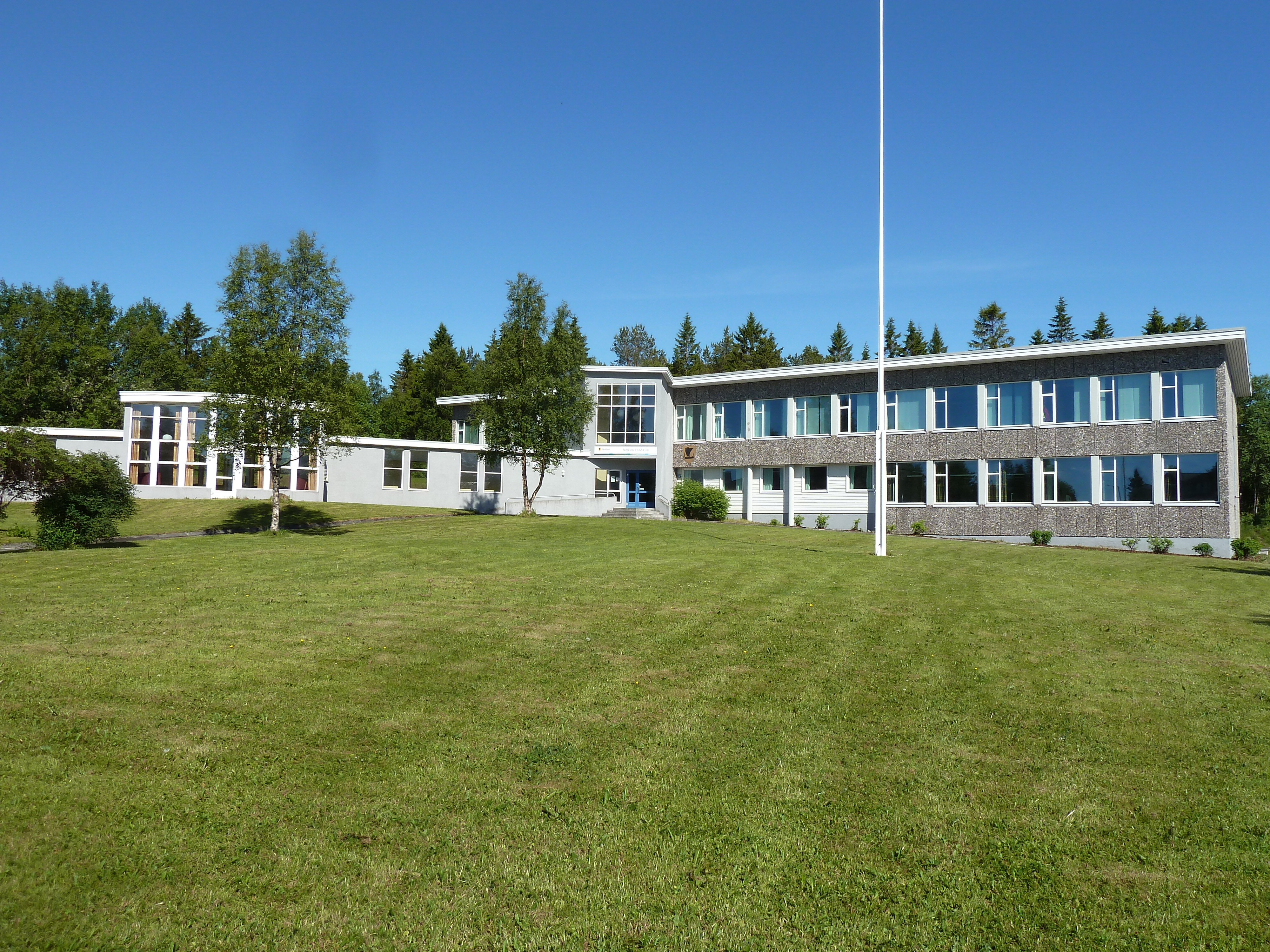 Narvik videregående skole, avdeling Solhaugen.